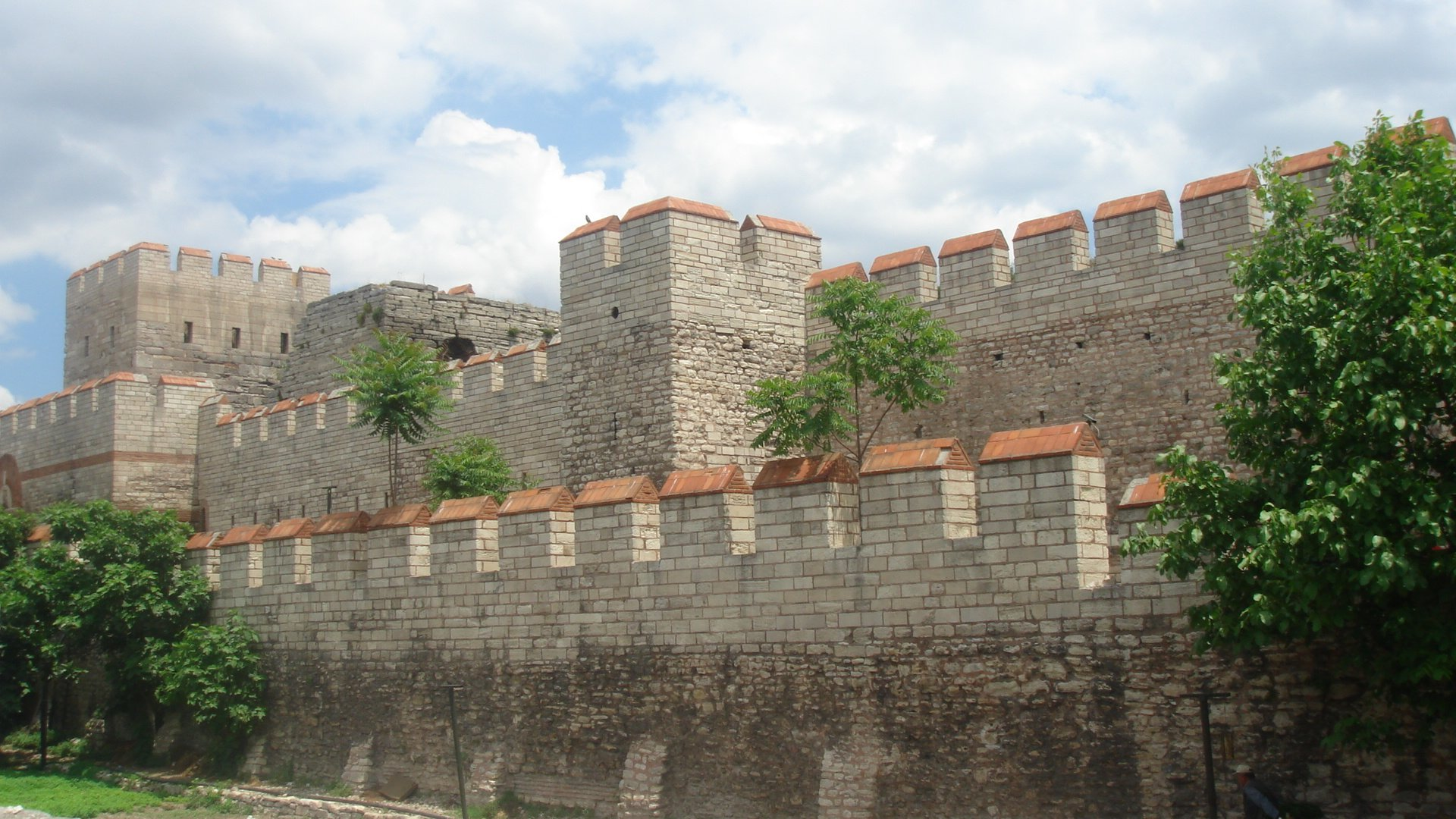 foto